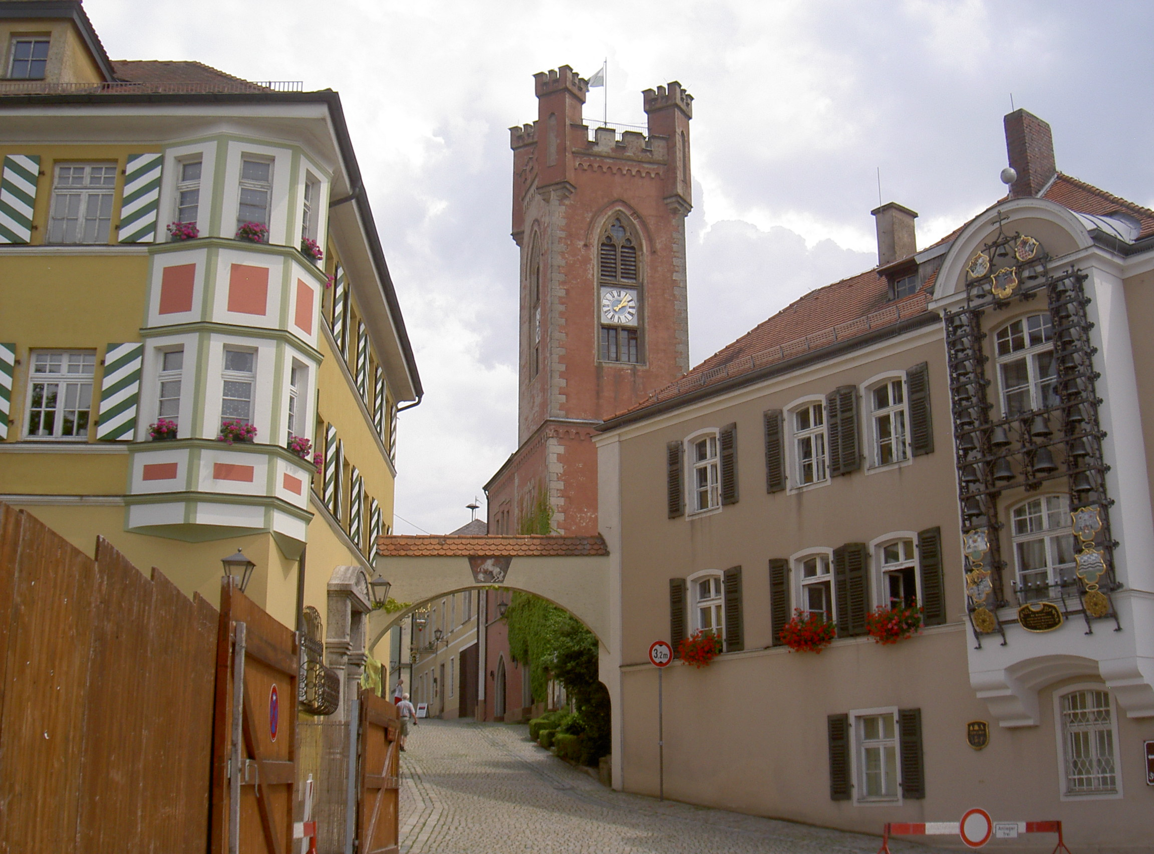 Schlossplatz (Furth im Wald)